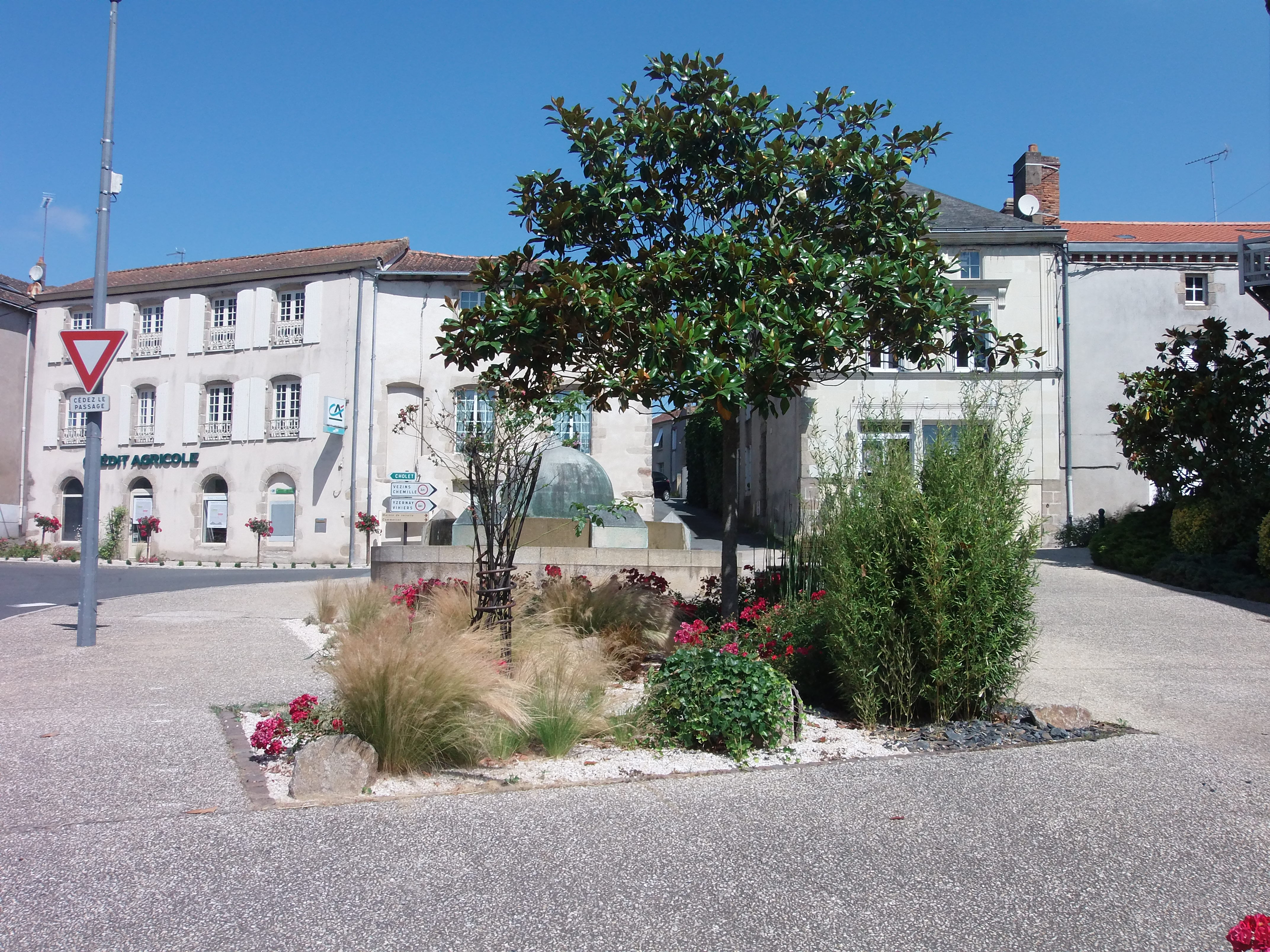 Maulévrier, place du château de Colbert (Maine-et-Loire, France). Juillet 2015.